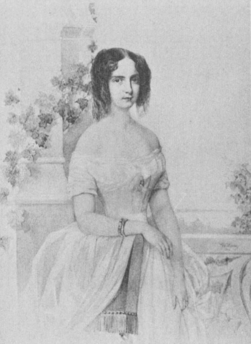 Екатерина Васильевна Голицына (1826-1853), дочь графа В.В.Левашова от второго брака с Е.В.Пашковой, с 1846 года жена князя Бориса Дмитриевича Голицына (1819-1878).